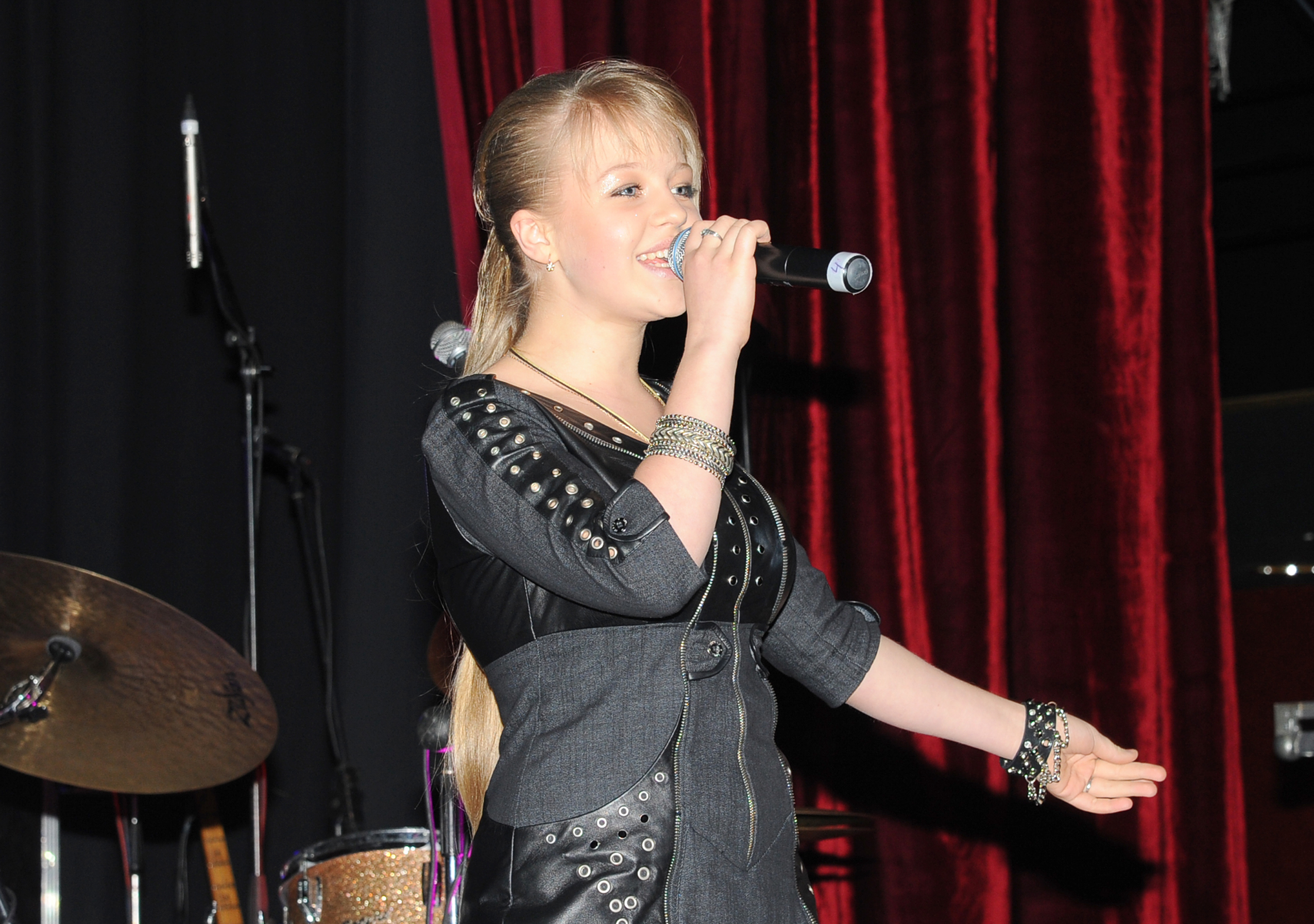 Виктория